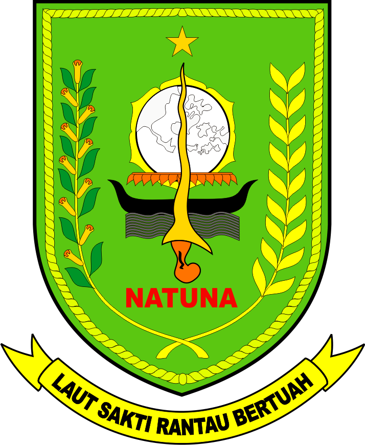 Seal of Natuna Regency